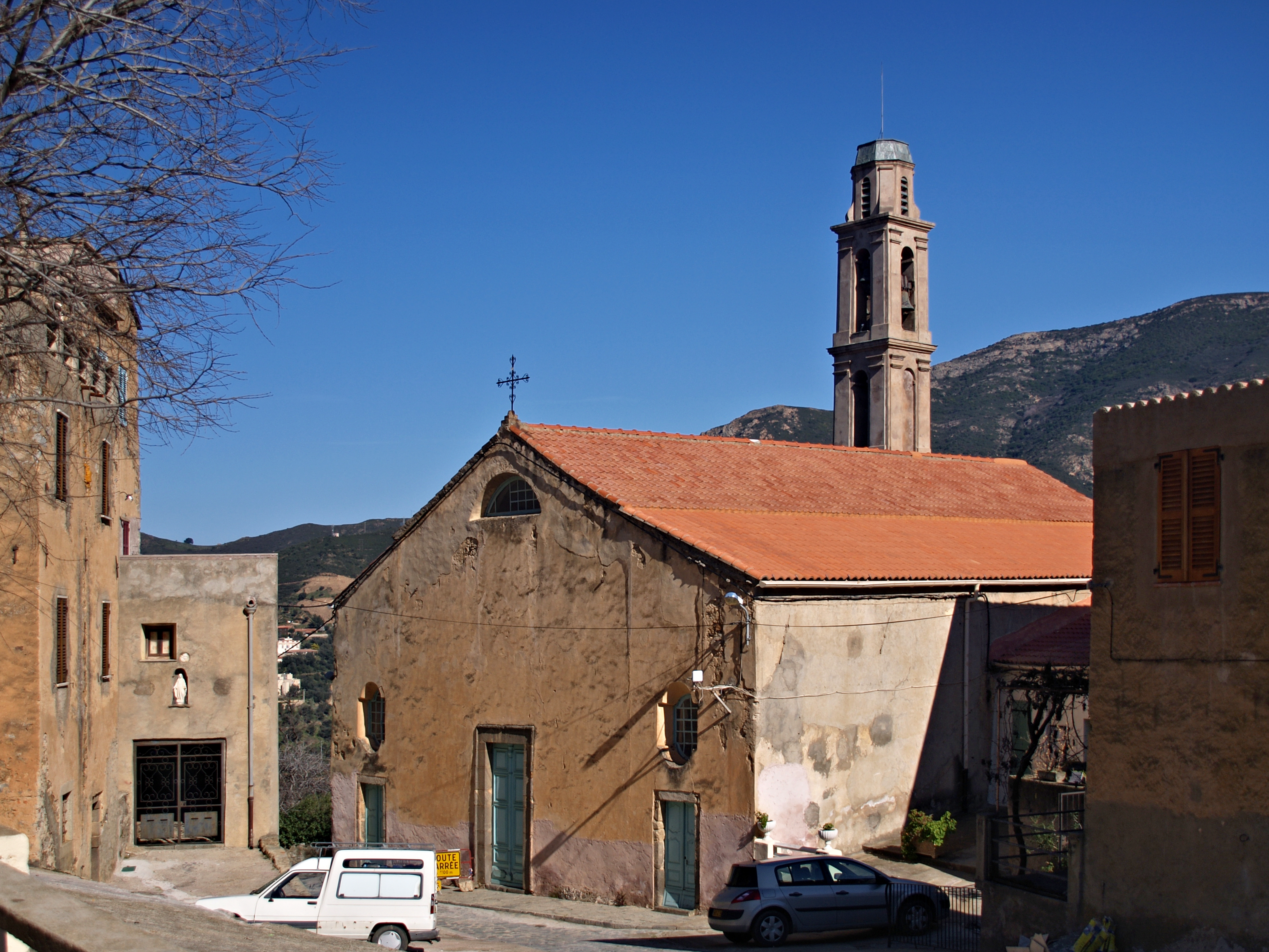 Occhiatana, Balagne (Haute-Corse) - Ancienne église de l'Assomption (Santa Maria Assunta), actuelle église paroissiale Saint-Barthélémy.